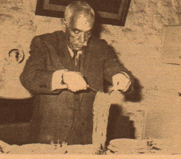 Nicolás Musmanni, empresario italiano radicado en Costa Rica. Década de 1910.